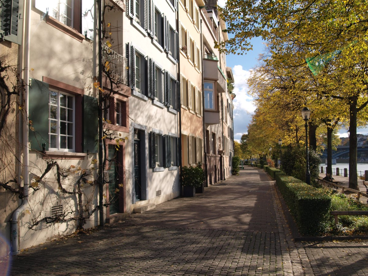 Altstadt Kleinbasel, Basel, Switzerland